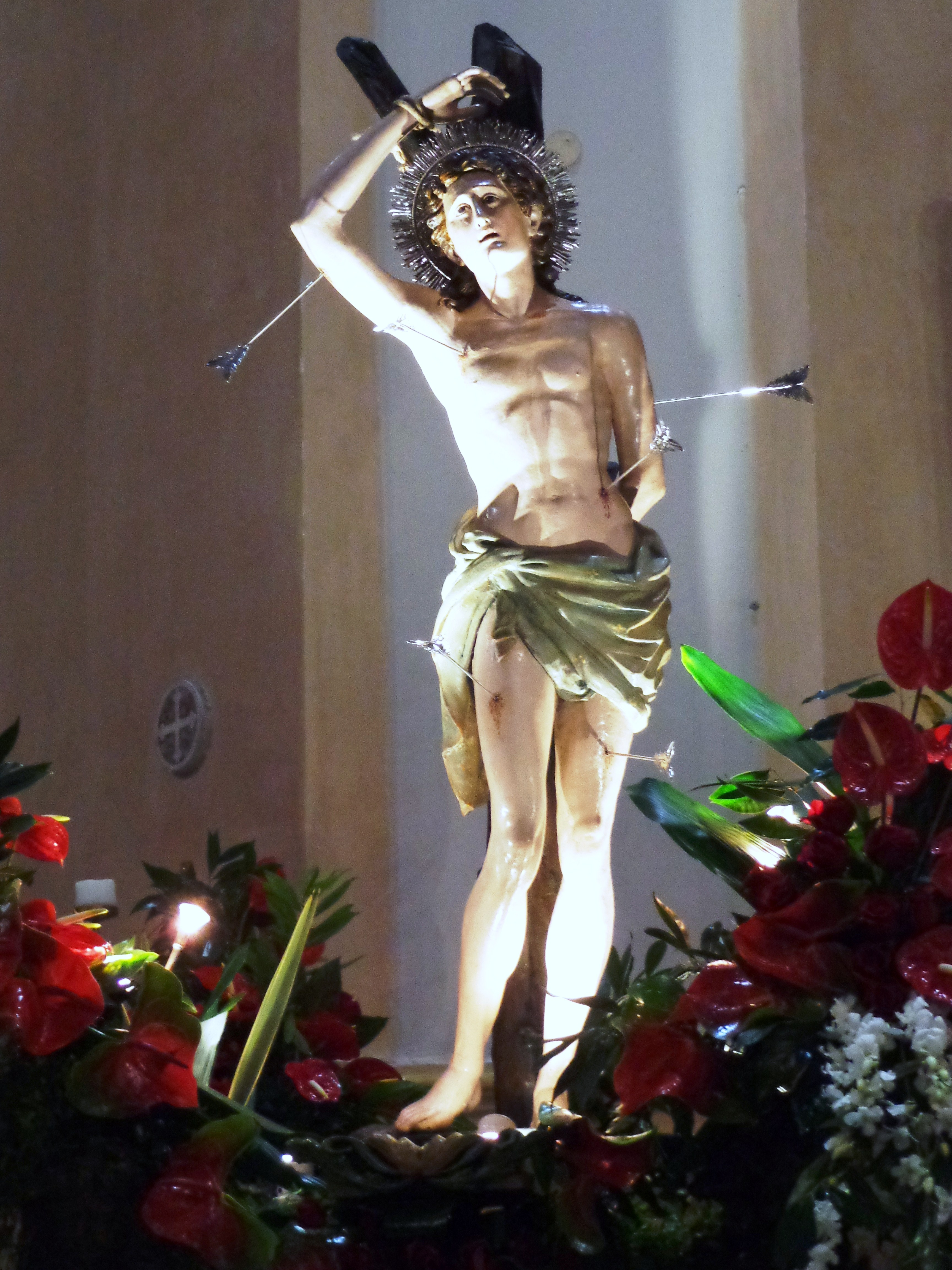 La statua lignea Settecentesca di San Sebastiano Barcellona Pozzo di Gotto.